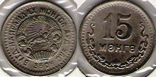 15 mongo